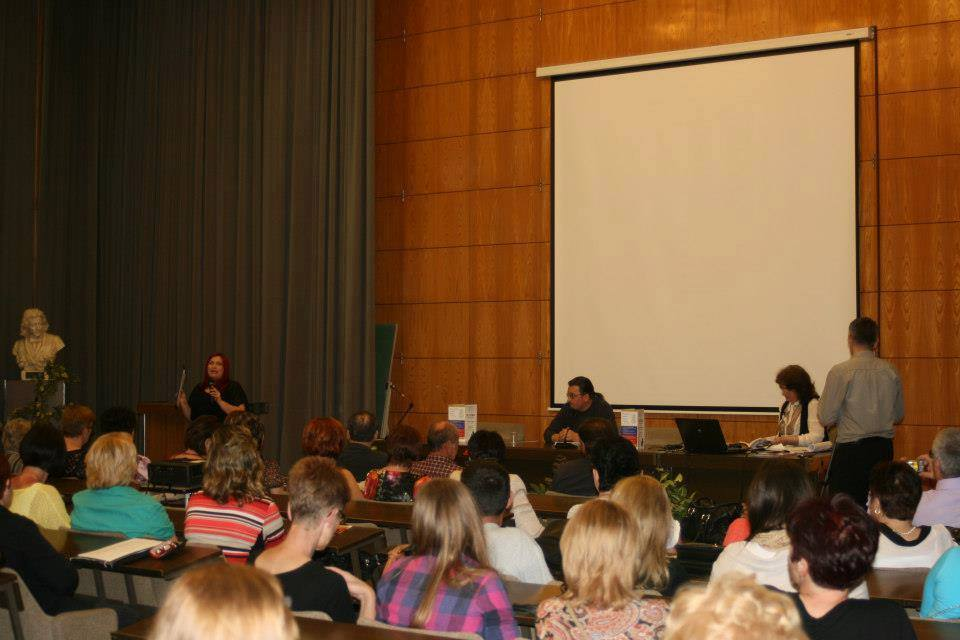 "Међународни фестивал културе" Крањ 2013, Словенија. Поетско вече са Браниславом Лукиђ Луком (БиХ) и Васвијом Дедиђ Бачевац (Шведска).